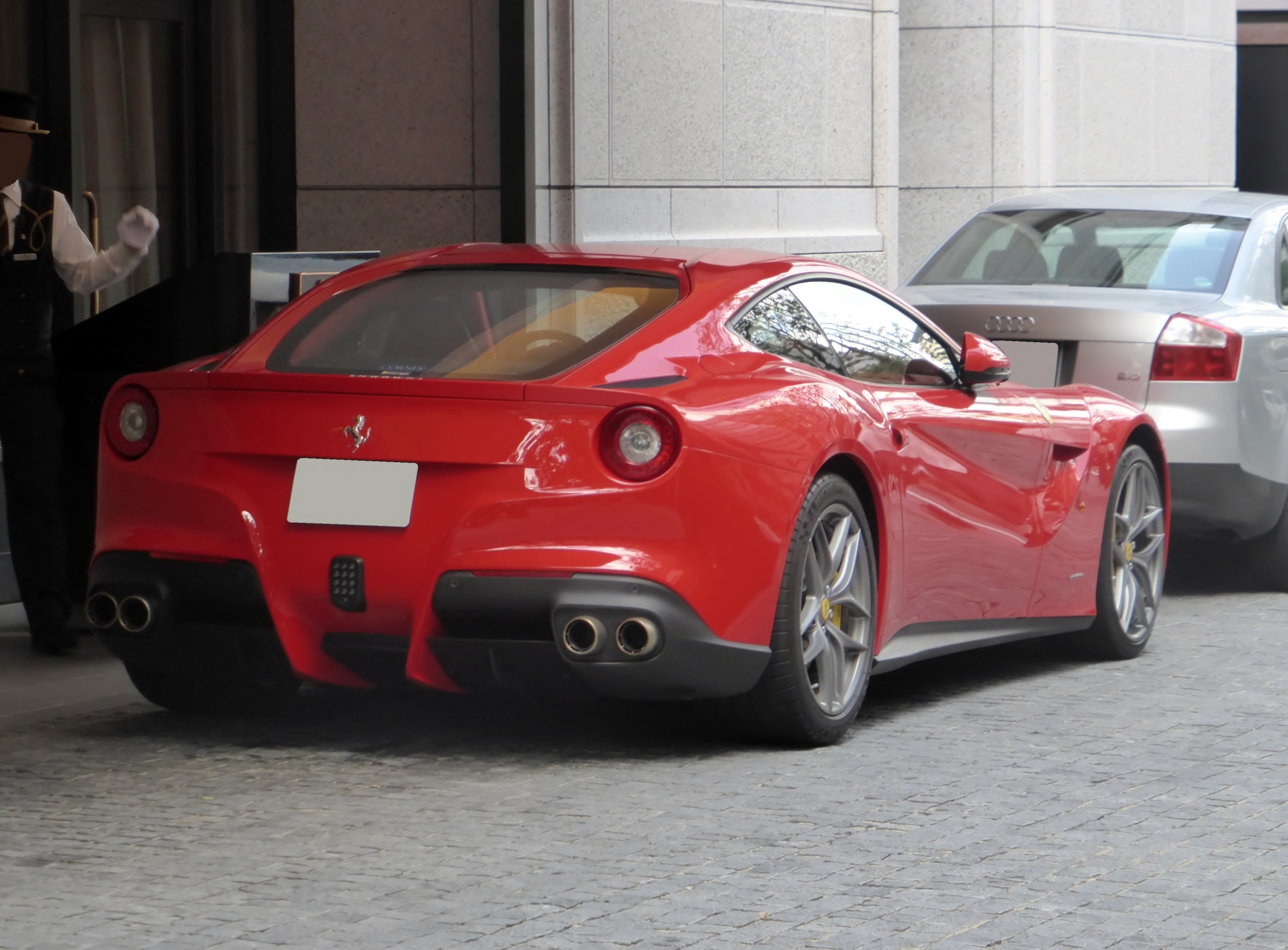 フェラーリ・F12ベルリネッタをリアから撮影。